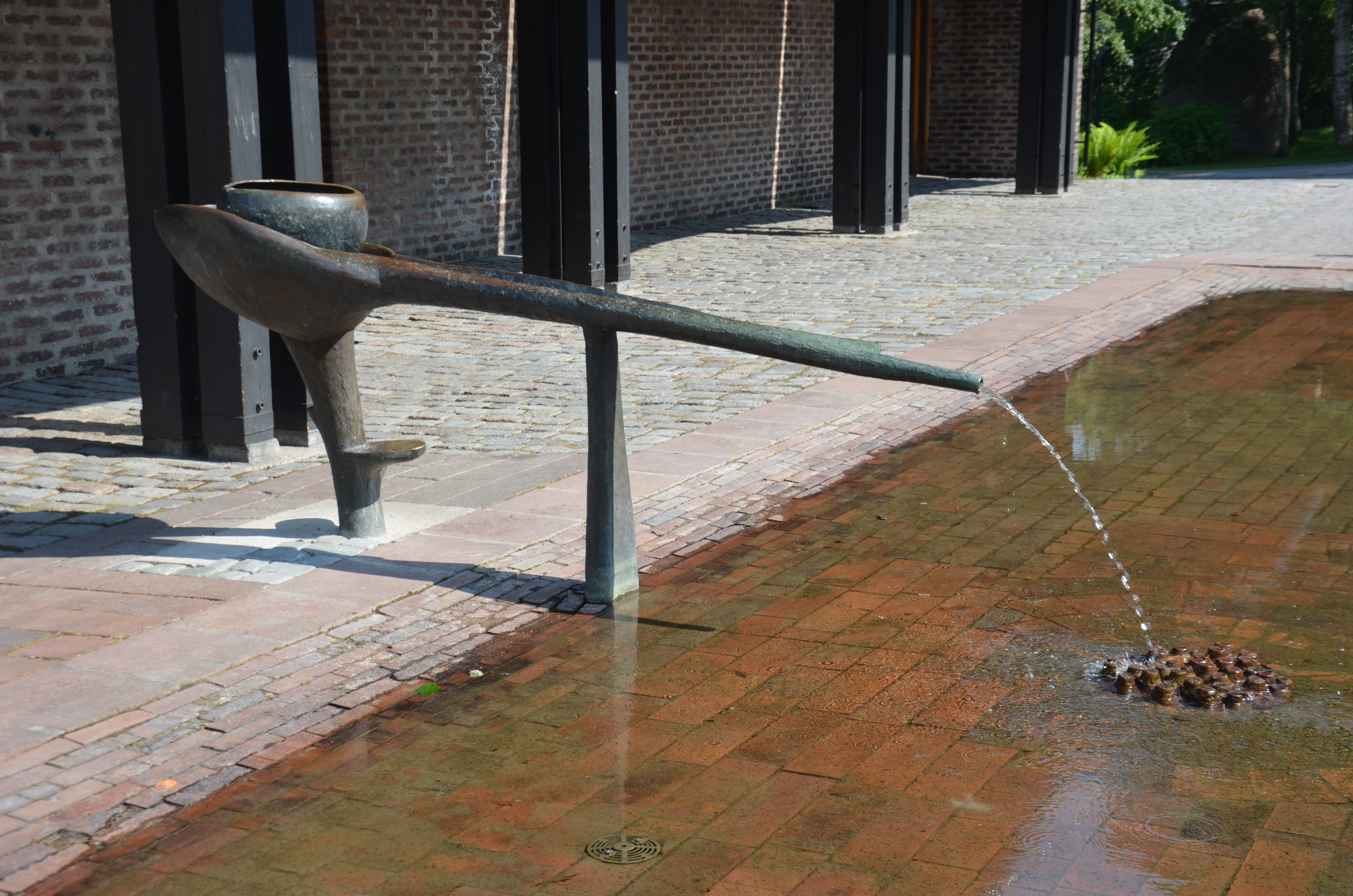 Robert Nilssons Lotusblomman utanför Markuskyrkan i Björkhagen i Stockholm